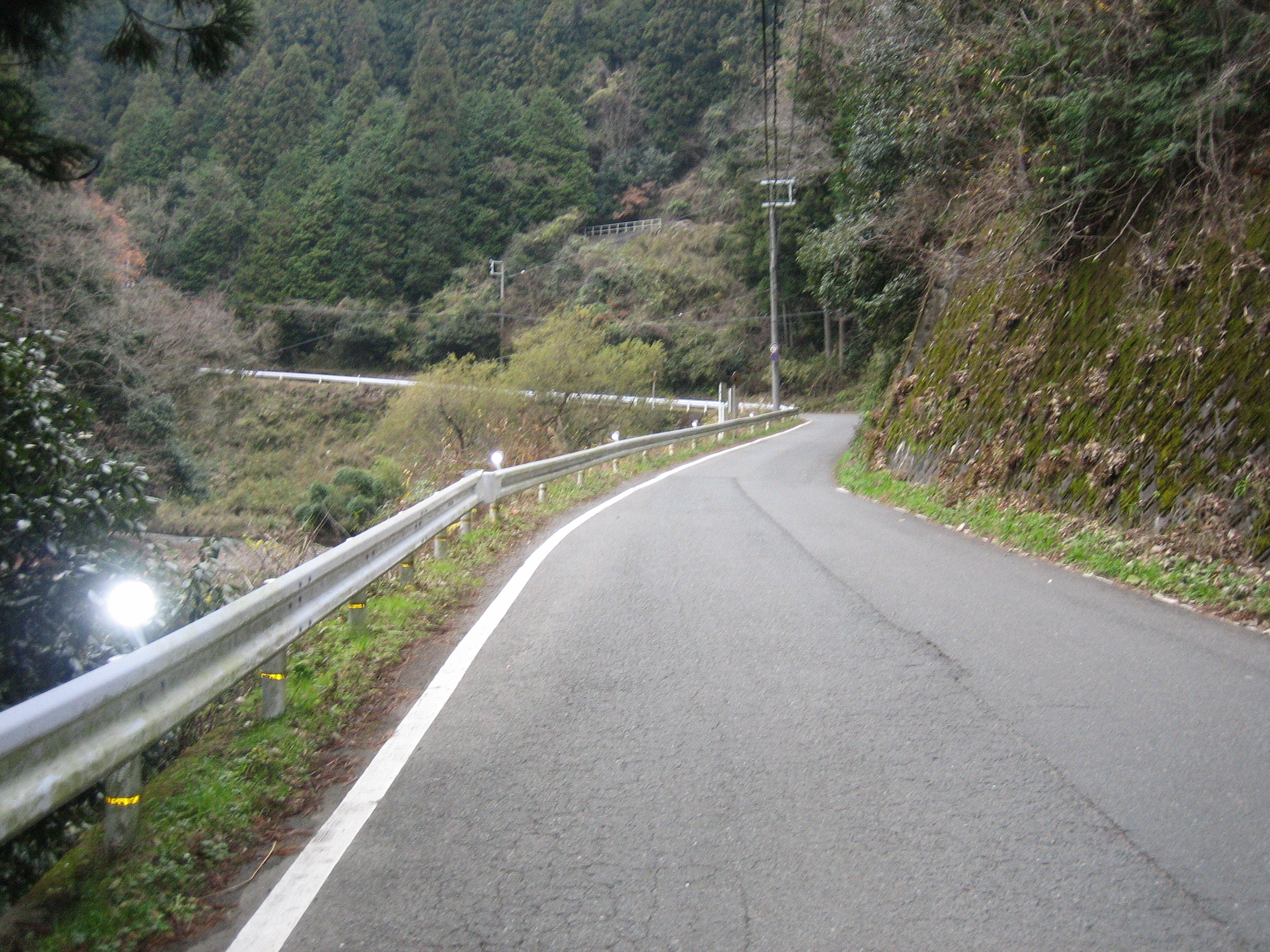 京都府道61号京都京北線を上賀茂十三石山地内から撮影